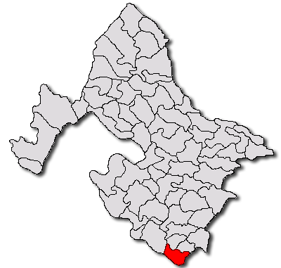 Categorie:Hărţi ale judeţului Mehedinţi